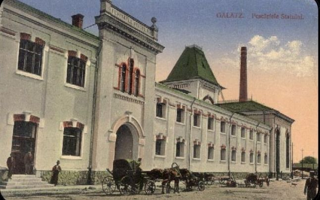 Pescăriile Statului